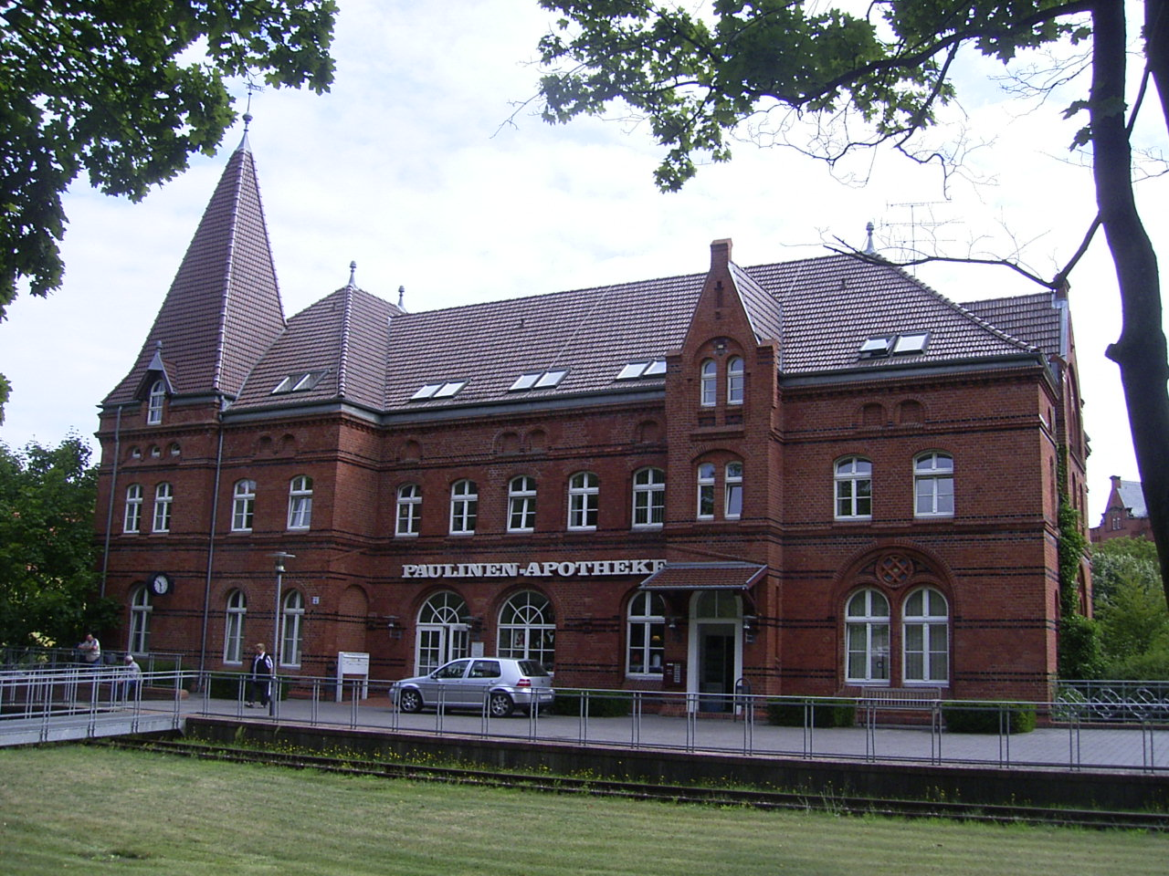 Der Paulinenauer Bahnhof in Neuruppin war der Endpunkt der Paulinenaue-Neuruppiner Eisenbahn, die 1970 stillgelegt wurde. Heute beherbergt das Gebäude eine Apotheke. This is a photograph of an architectural monument.